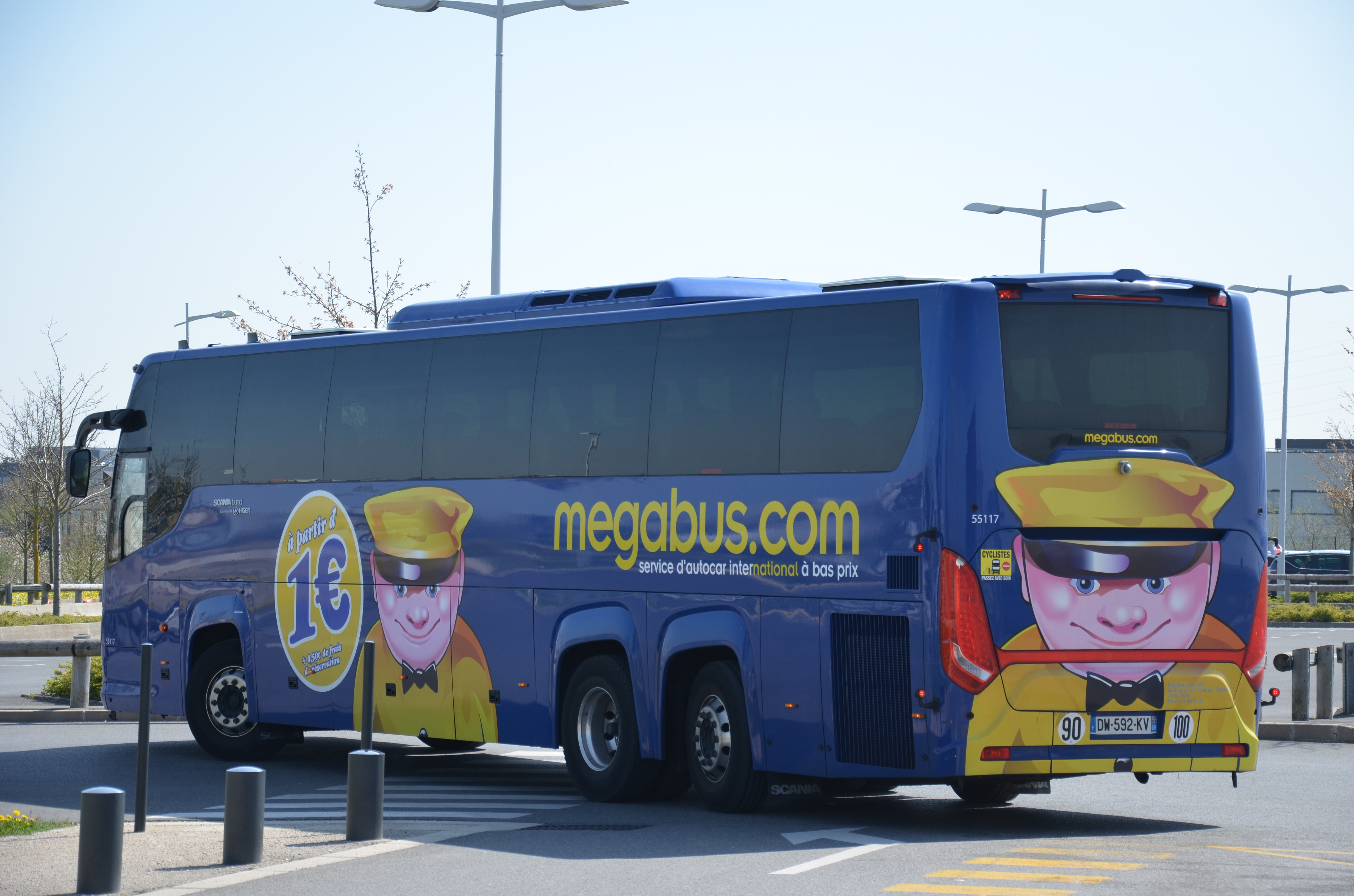 Arrière d'un Scania Touring de la compagnie Megabus France, en gare de Champagne Ardenne TGV (près de Reims), en avril 2016.